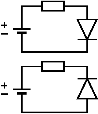 Diode